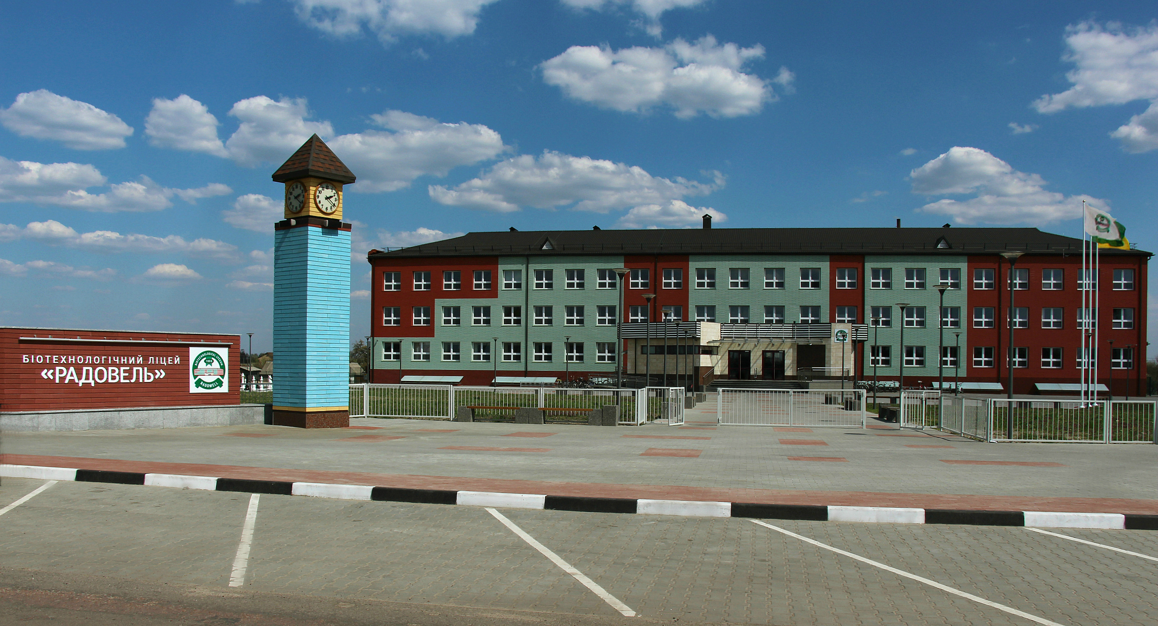 Біотехнологічний ліцей Радовель Загальний вид